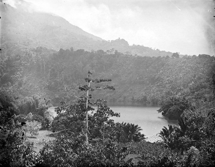 Negatief. Meer, Ternate